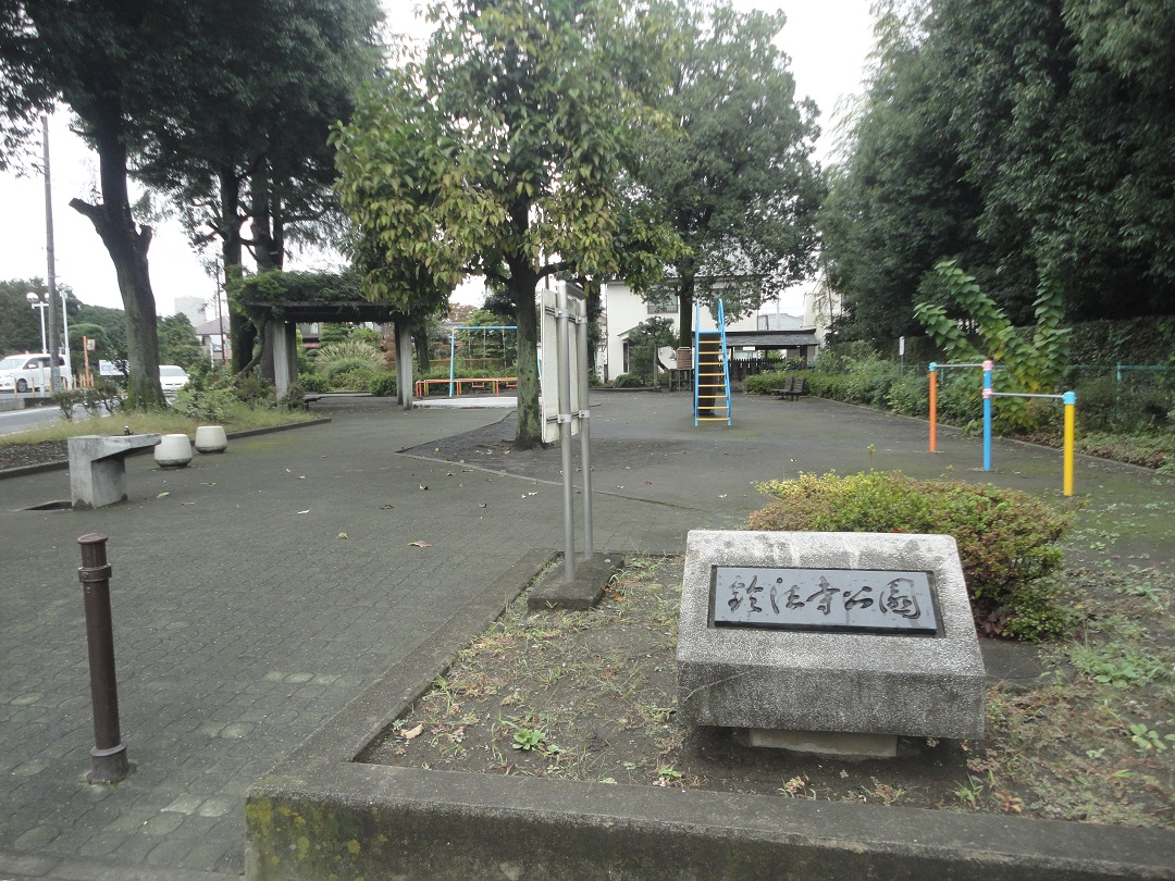 東京都青梅市にある鈴法寺公園（明治時代まであった鈴法寺跡）。